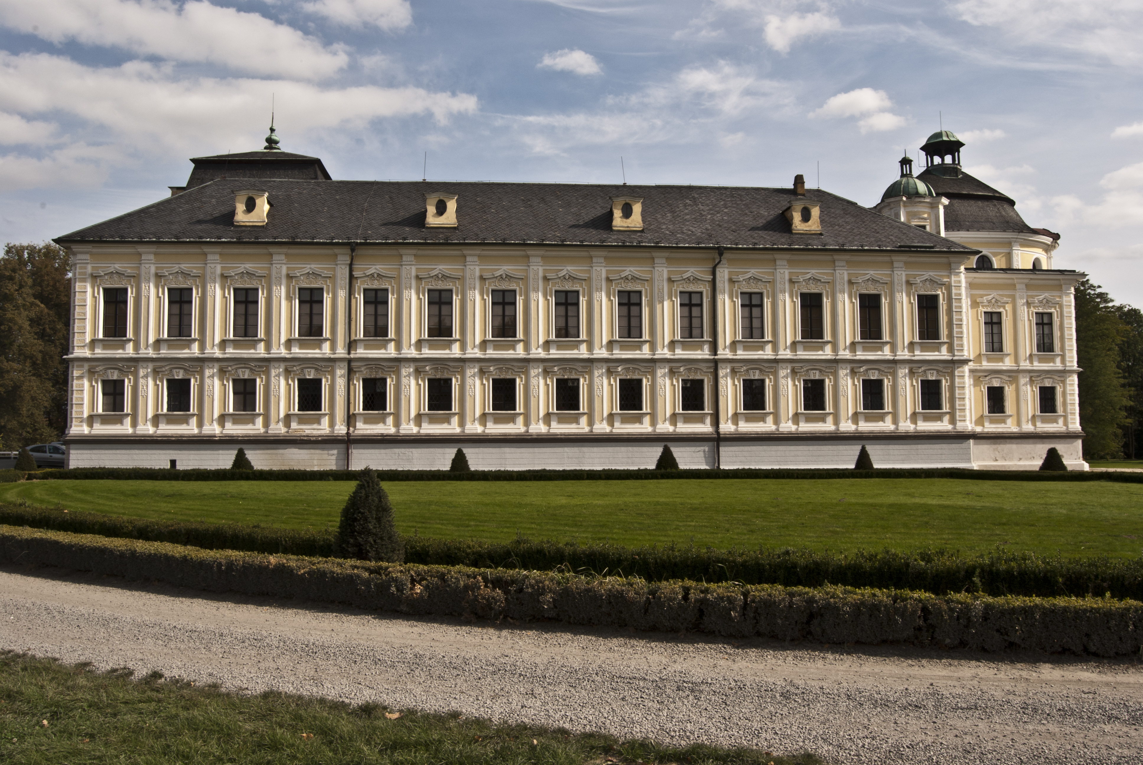 Zámek s parkem Kravaře, Alejní 377/24, Kravaře